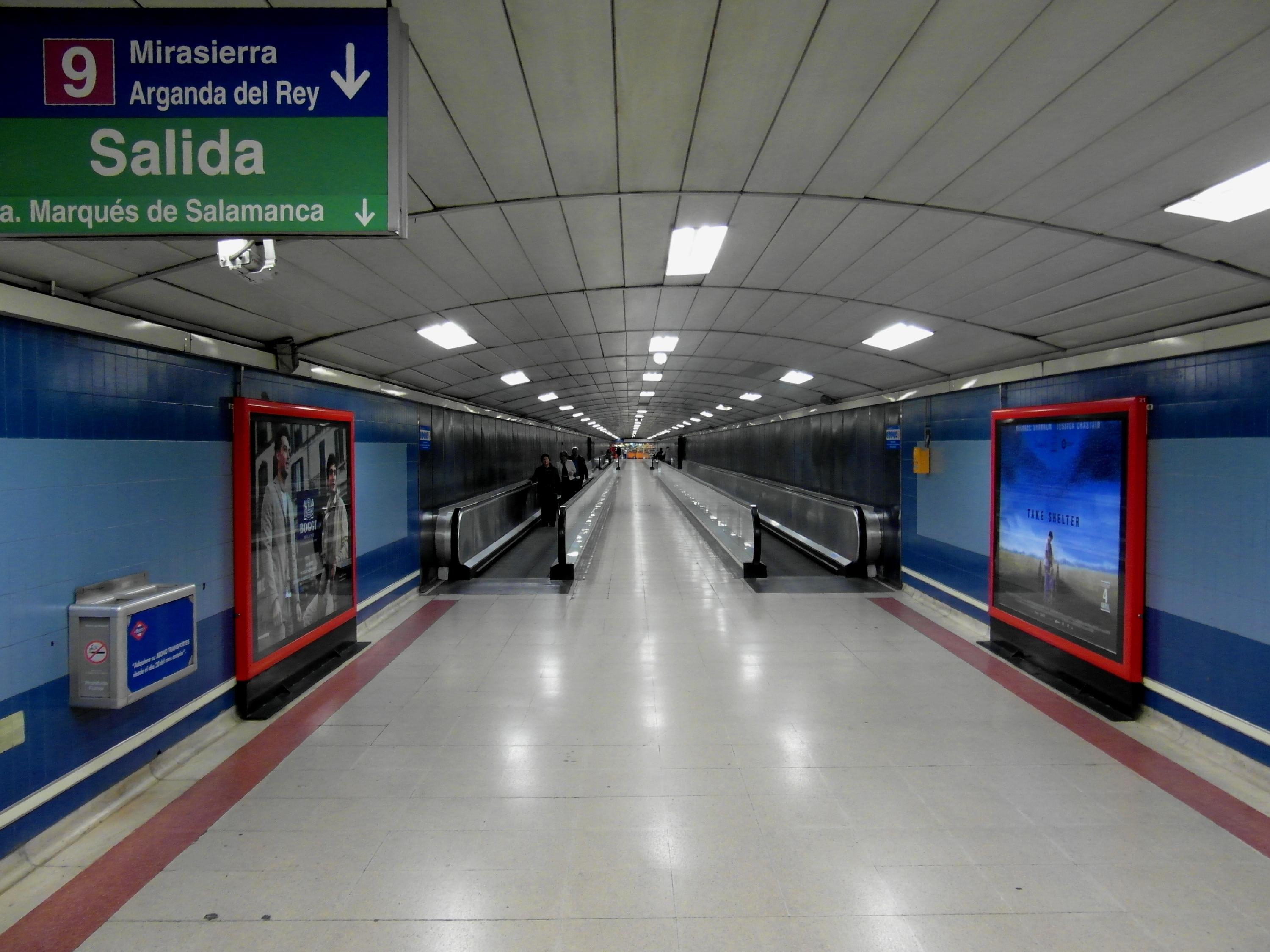 Madrid - Metro - Estación de Núñez de Balboa